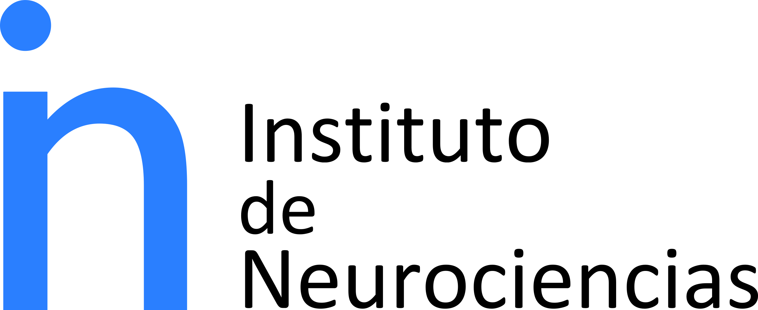 Logotipo del Instituto de Neurociencias.